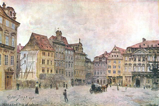 Steroměstské náměstí, severní strana (po prvním asanačním zásahu, 1896)